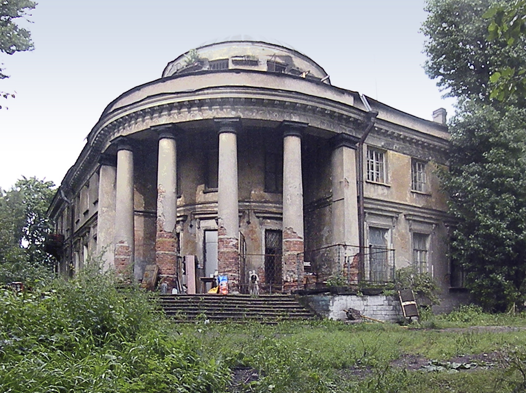 Уткина дача.Главное здание